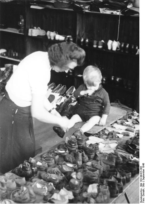 ADN-ZB/Donath Deutschland (sowjetische Besatzungszone) 130 Tauschzentralen der Volkssolidarität gibt es 1948 in der sowjetischen Besatzungszone.Sie wurden eingerichtet, um die Versorung der Bevölkerung durch Austausch von Waren zu verbessern. UBz.: Tauschzentrale in Herzberg/ Kreis Schweidnitz. Mutti tauscht für Peter die zu klein gewordenen Schuhe gegen größere ein. Aufn. Sept. 1948